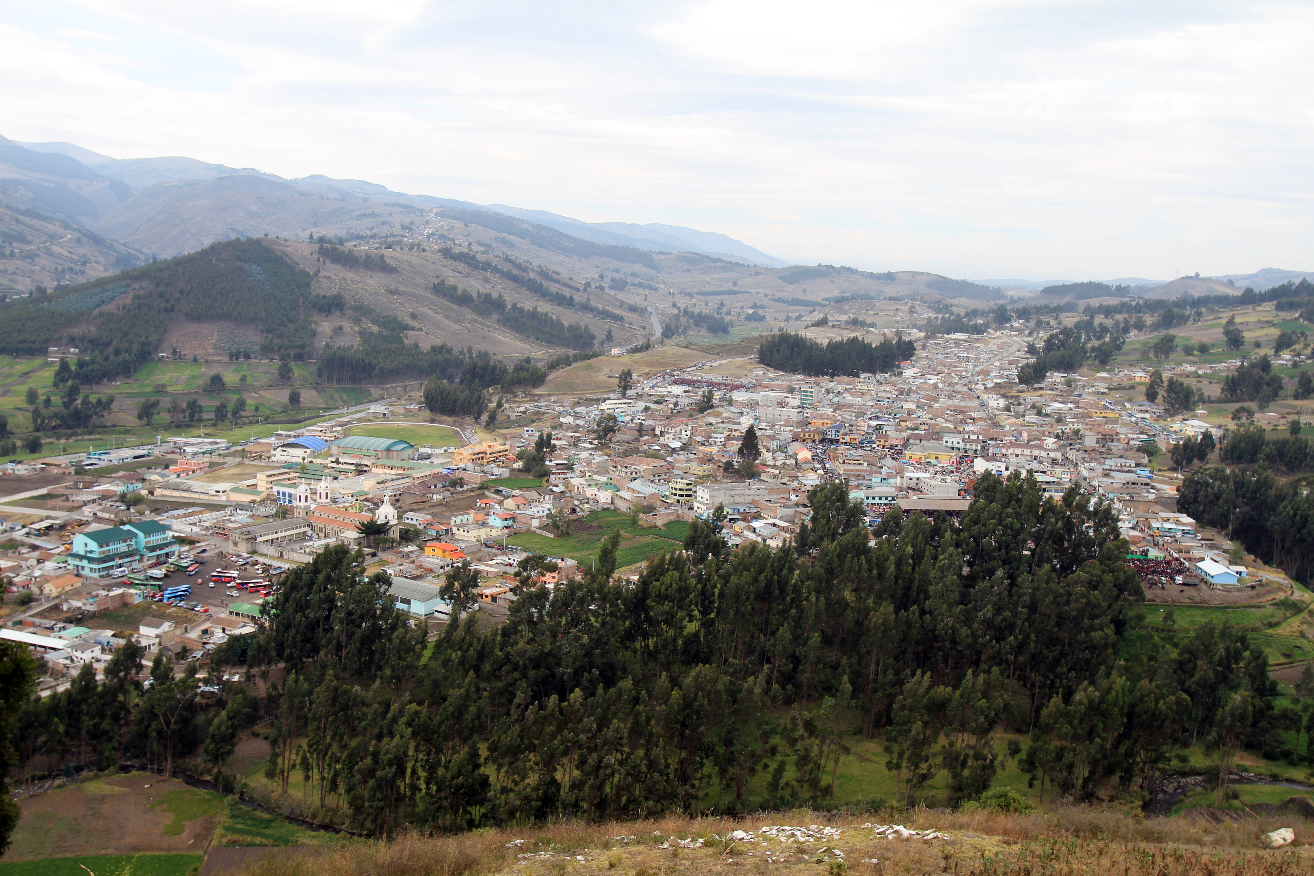 Panorámica Guamote, prov Chimborazo